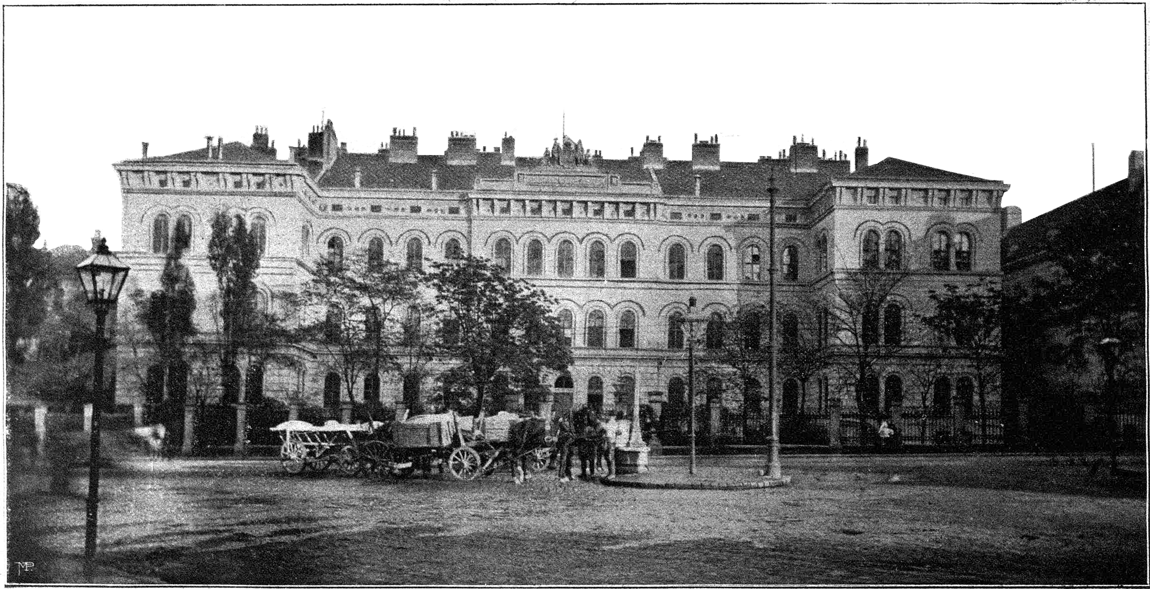 Wien-Alsergrund, Spitalgasse 4, Pathologisch-Anatomisches Institut (erbaut 1858/62)